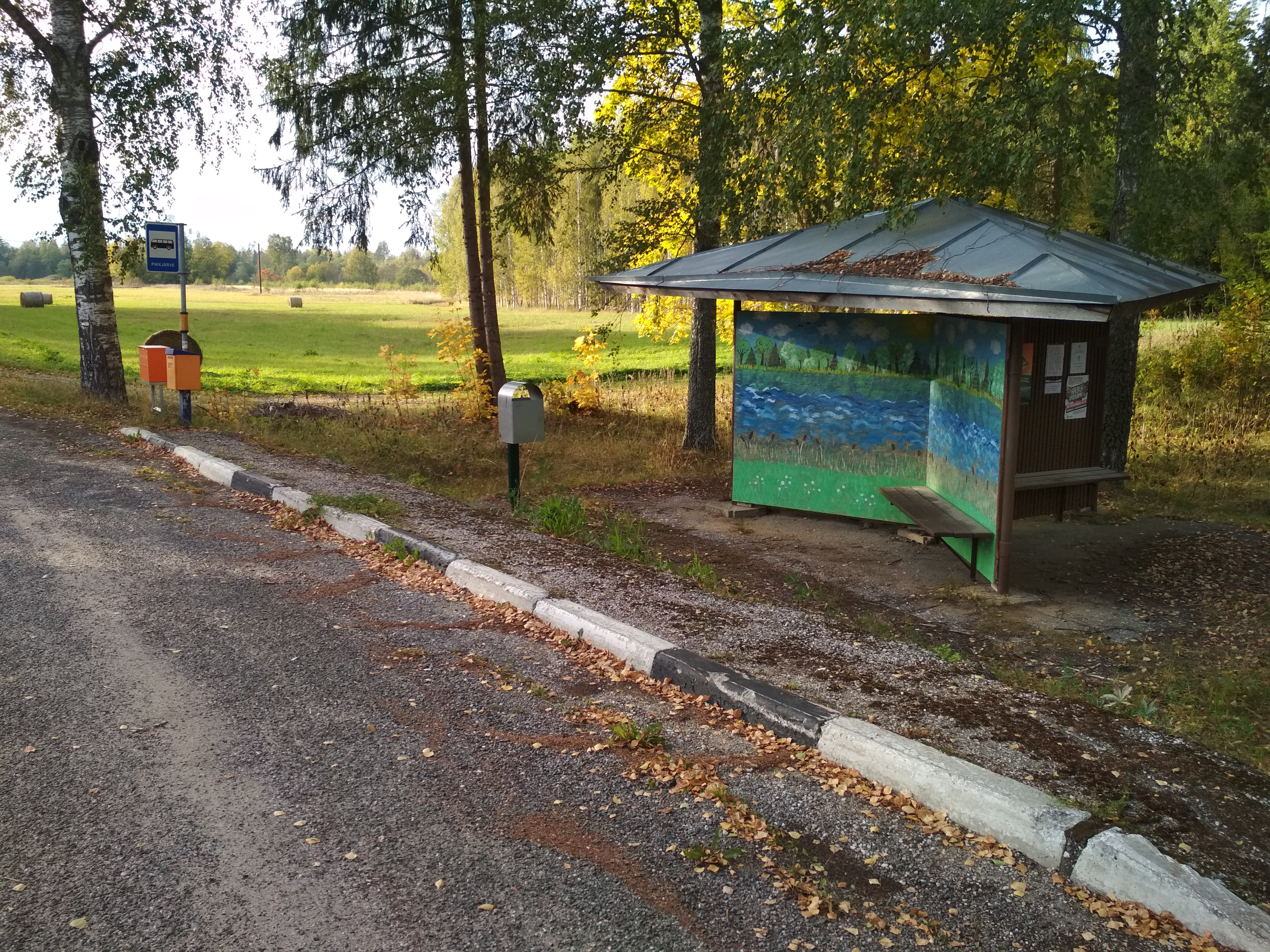 Pikkjärve bussipeatus Valgamaal